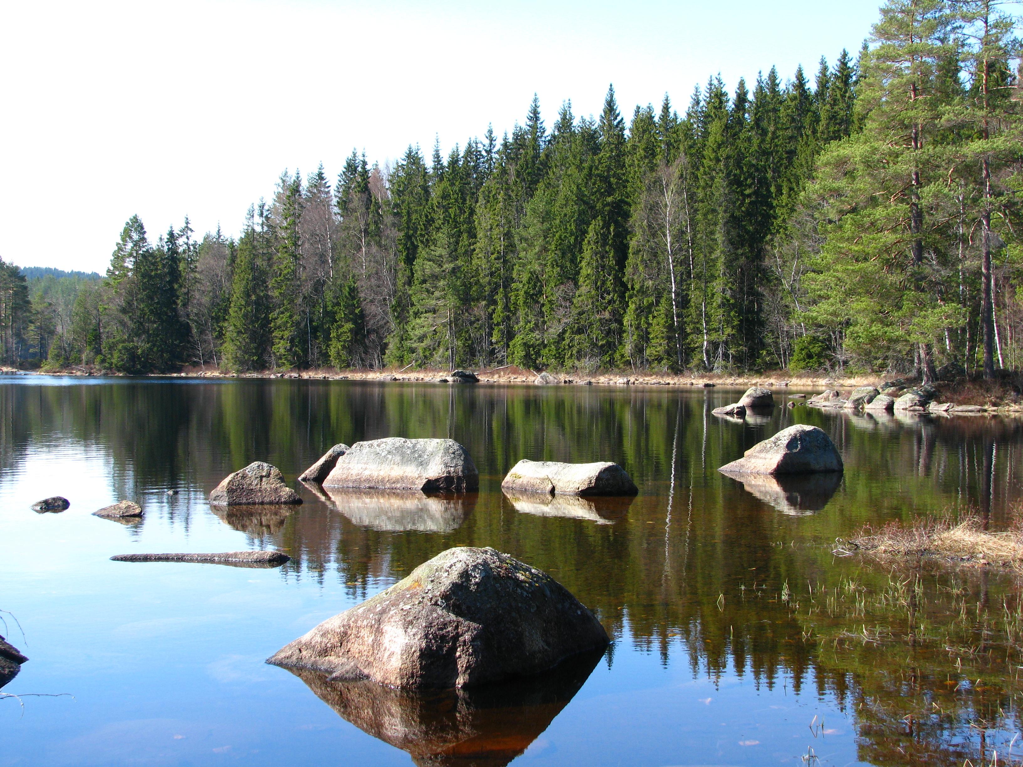 Skärjen (utanför Loka Brunn) fotograferad från den norra stranden.